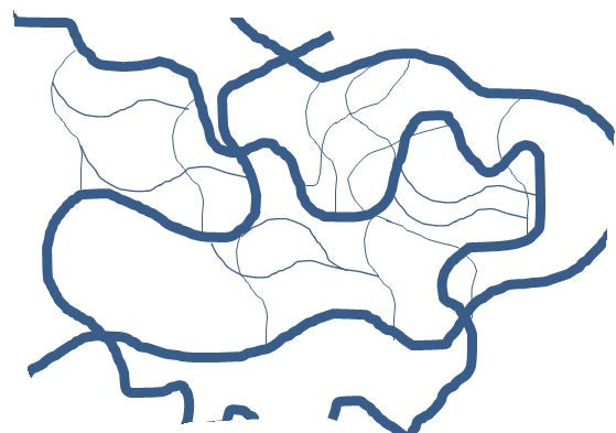 schematische Zeichnung von kleinen schmalen Gängen innerhalb eines Ameisennestes einer größeren Ameinsenart